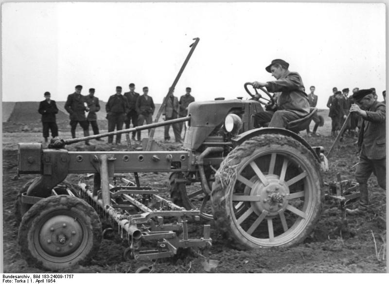 Apolda-Hausdorf , Vorstellung einer Legemethode Zentralbild TBD-Torka Ne-Sta. 5 Mot. 1.4.1954 MTS Apolda-Hausdorf führte Quadrat-Nestpflanzverfahren vor An einem "Tag des sowjetischen Neuerers" führten die Kollegen der MTS Apolda-Hausdorf, Bez. Erfurt, den Genossenschaftsbauern und werktätigen Einzelbauern das Quadrat-Nestpflanzverfahren vor. Das Wesen dieses Verfahrens besteht darin, daß die Kartoffel nicht wie bisher in einer Reihe einzeln, sondern im Quadrat zu je zwei bis drei Knollen in einem Nest angepflanzt werden. Diese sowjetische Neuerermethode bringt eine grosse Ertragssteigerung. UBz: Der "Maulwurf" mit Vielfachgerät zieht die Quadrate für das Nestpflanzverfahren. Interessiert sehen die Bauern aus Ober- und Niederreissen der Arbeit des Traktoristen zu.